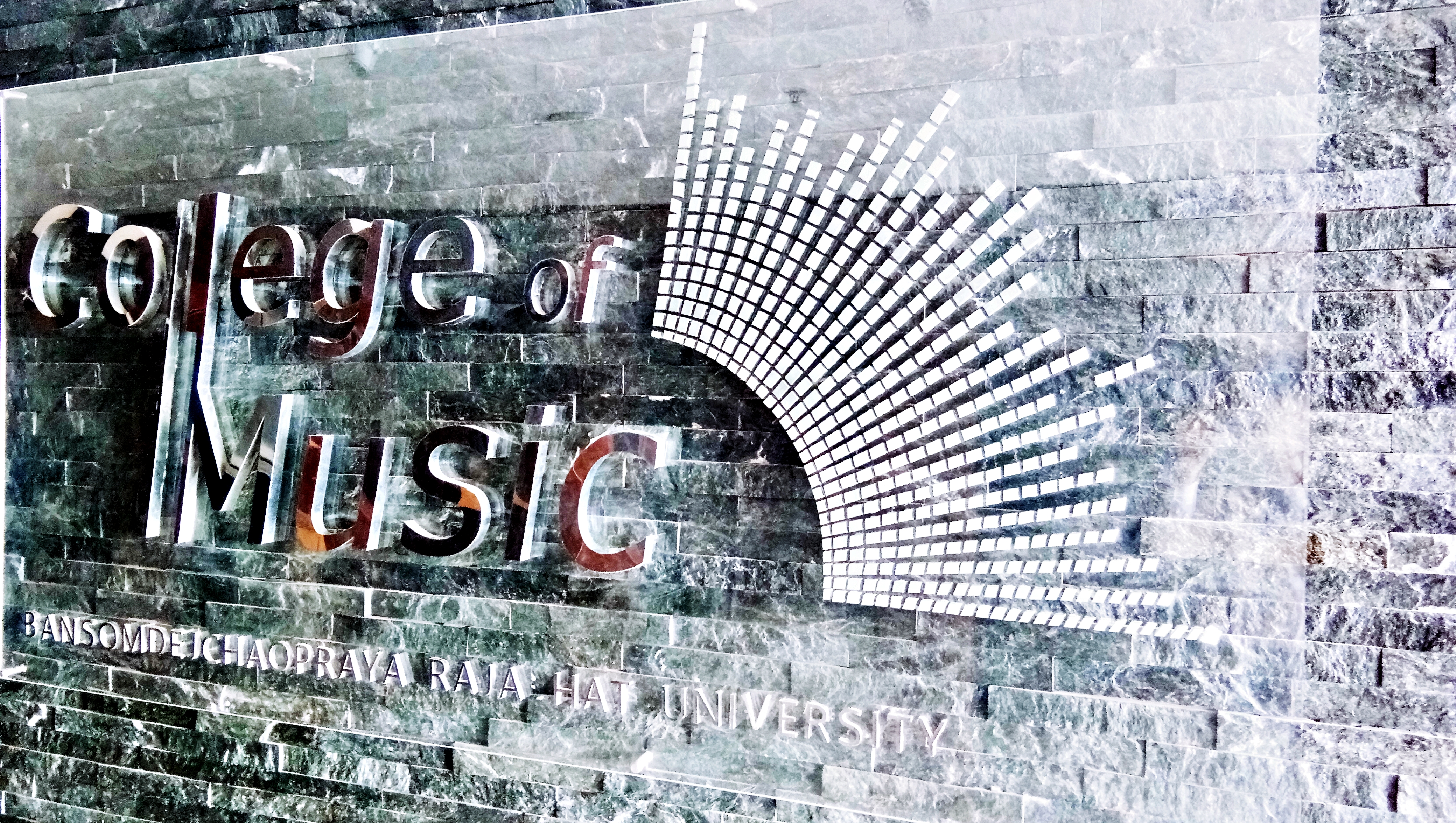 COLLEGE OF MUSIC BANSOMDEJ